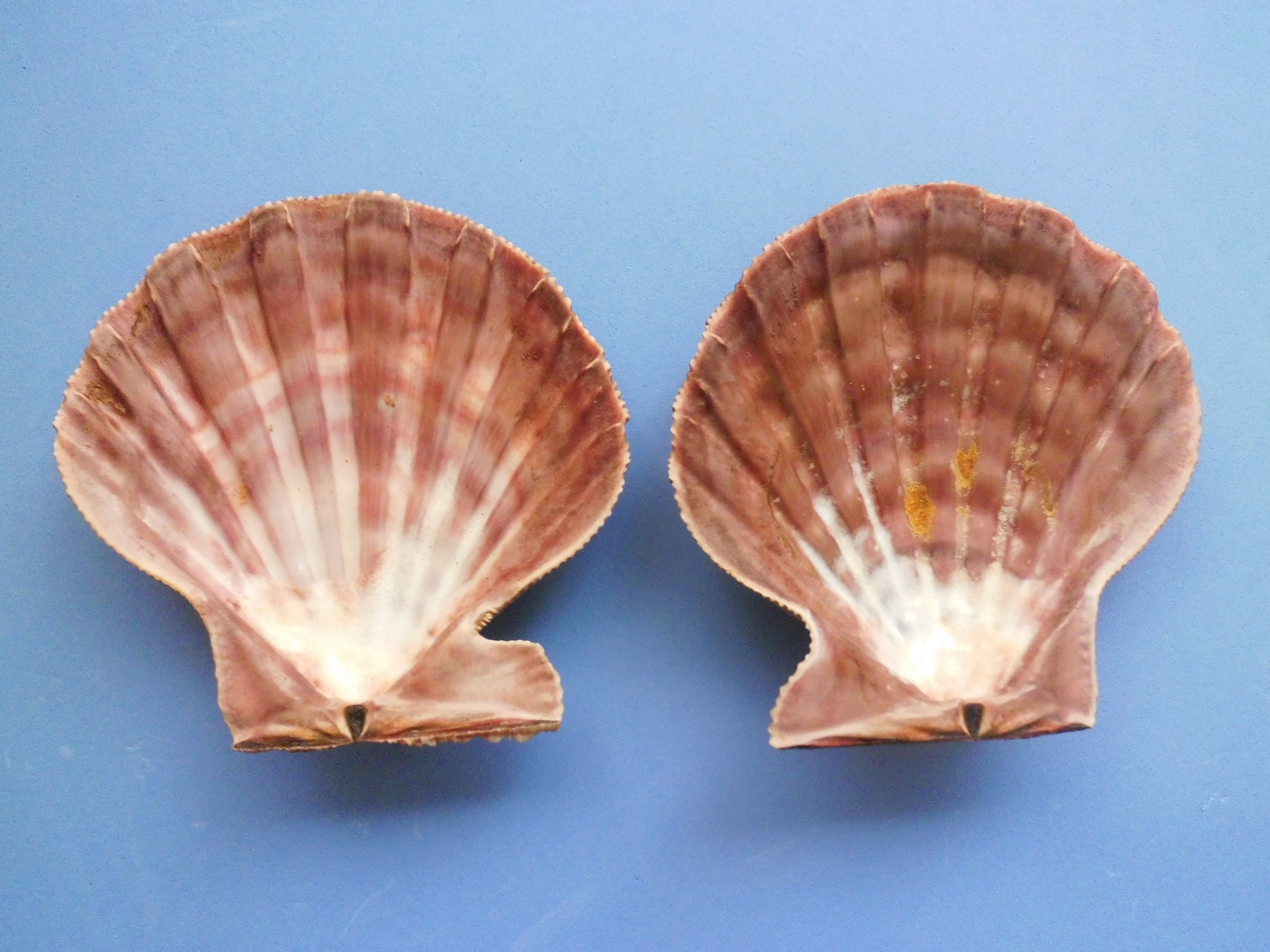 Nodipecten nodosus (Linnaeus, 1758) colectado en 2003 Puerto La Cruz, estado Anzoátegui - Venezuela